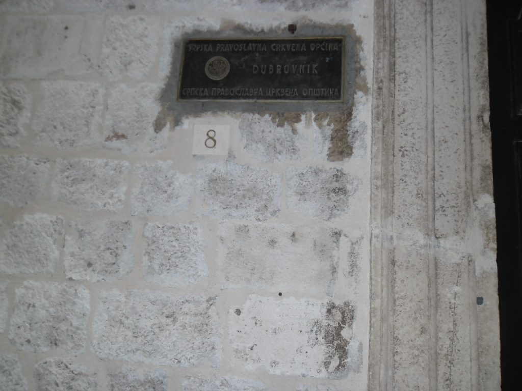 Srpska pravoslavna crkvena općina u Dubrovniku